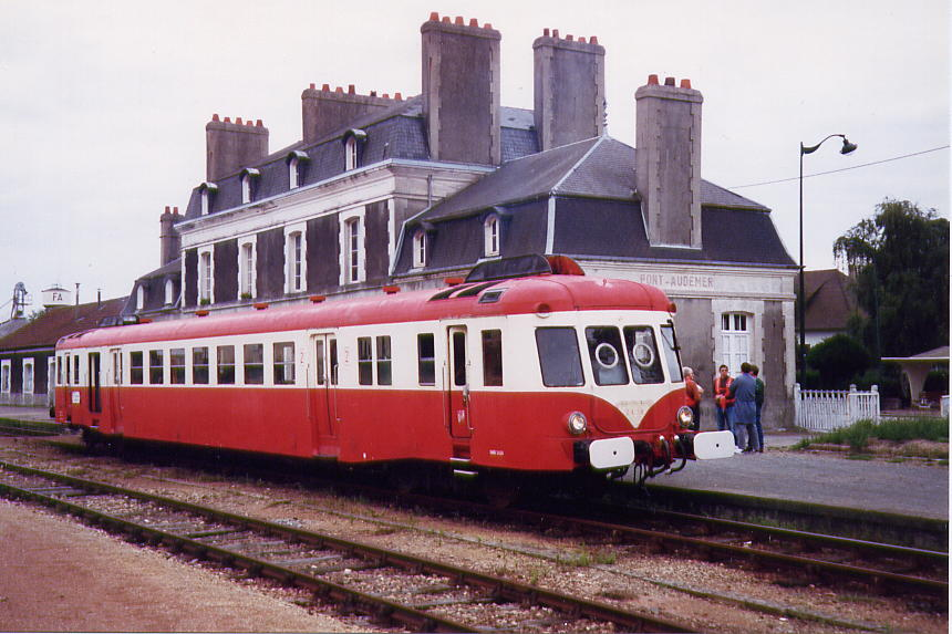 Autorail Decauville X 2426 600 ch -1952